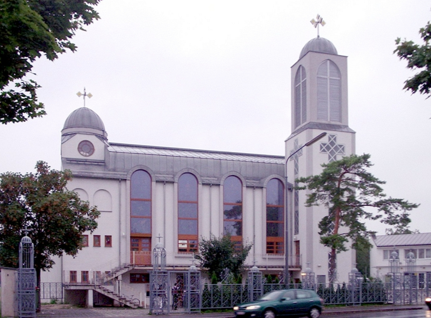 Heilige Jungfrau Maria von Zeituon Kirche, Coptic church, Vienna